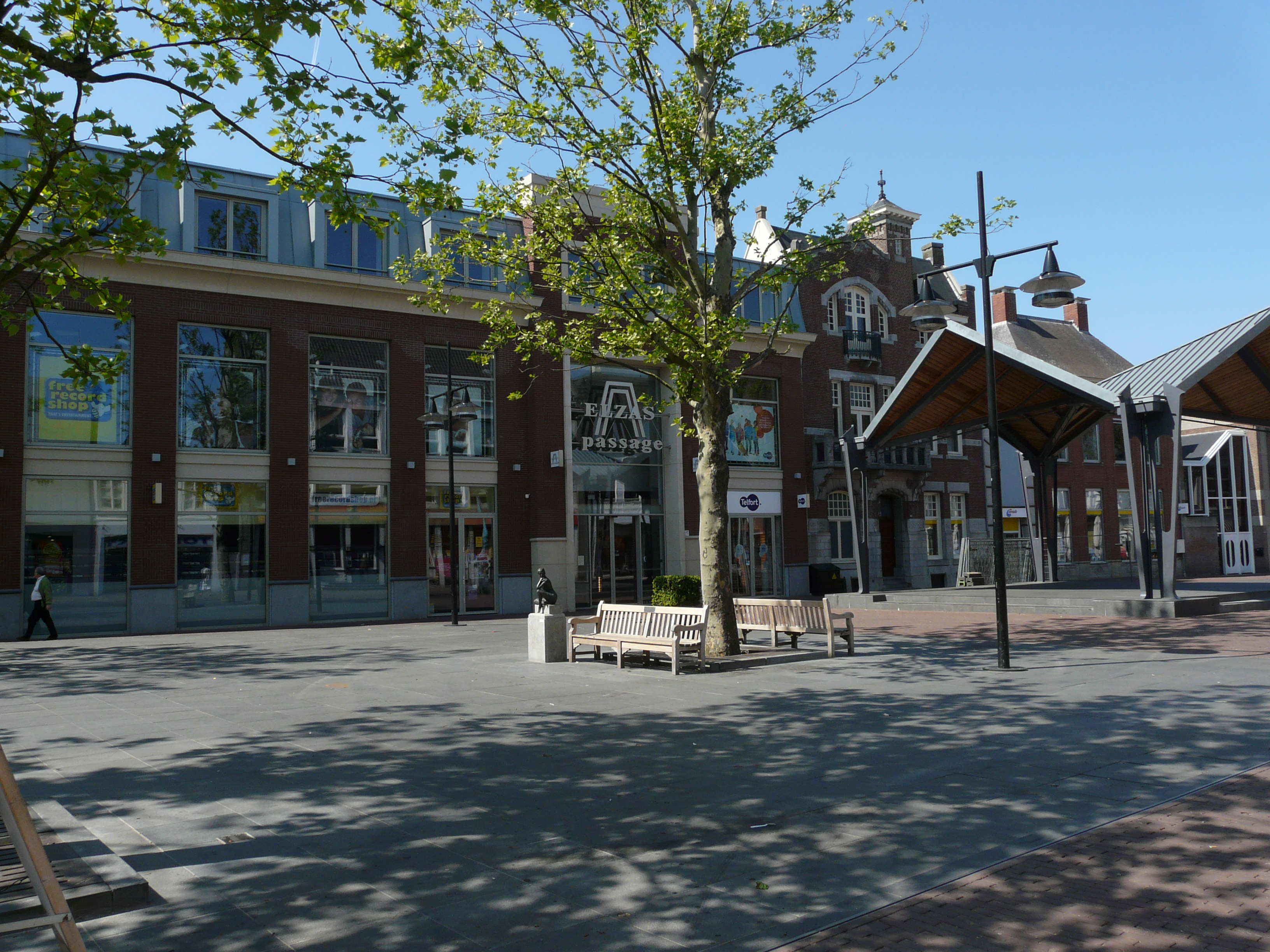 Markt in Helmond centrum